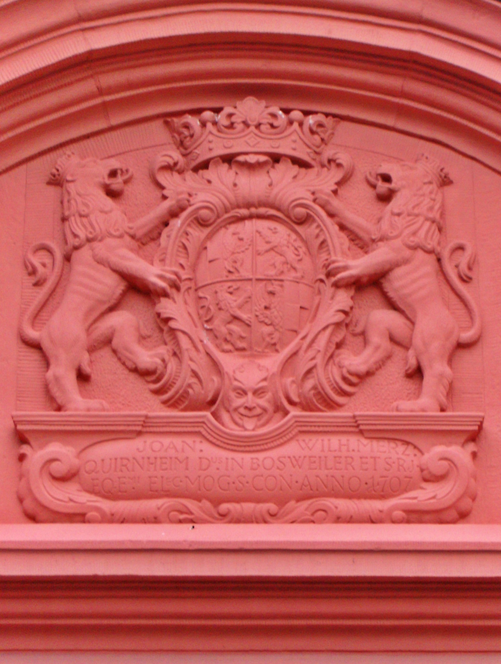 Boßweiler, kath. Pfarrkirche St. Oswald, Wappen der Merz von Quirnheim am Kirchenportal.